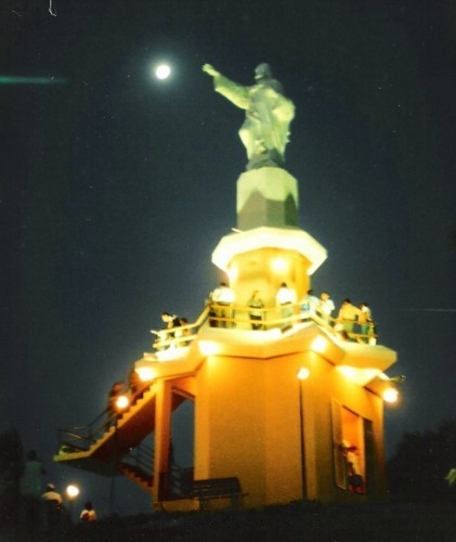 Mirante do Morro do Cristo em Guaratuba.